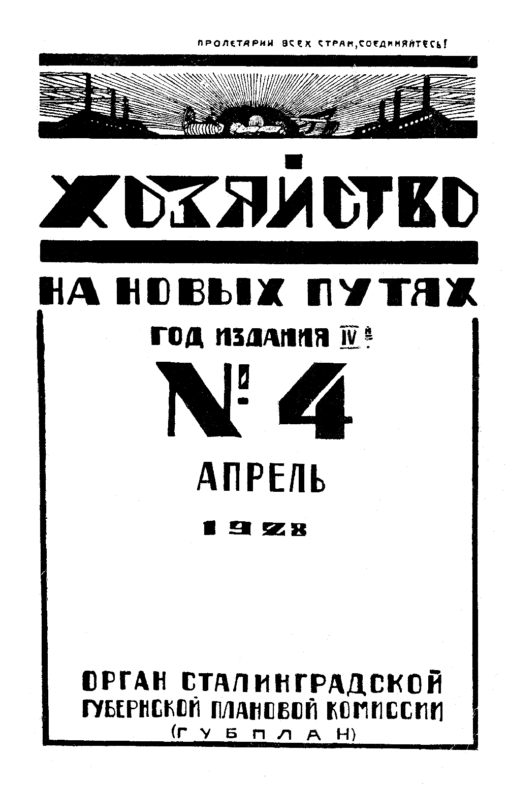 Хозяйство на новых путях 1928